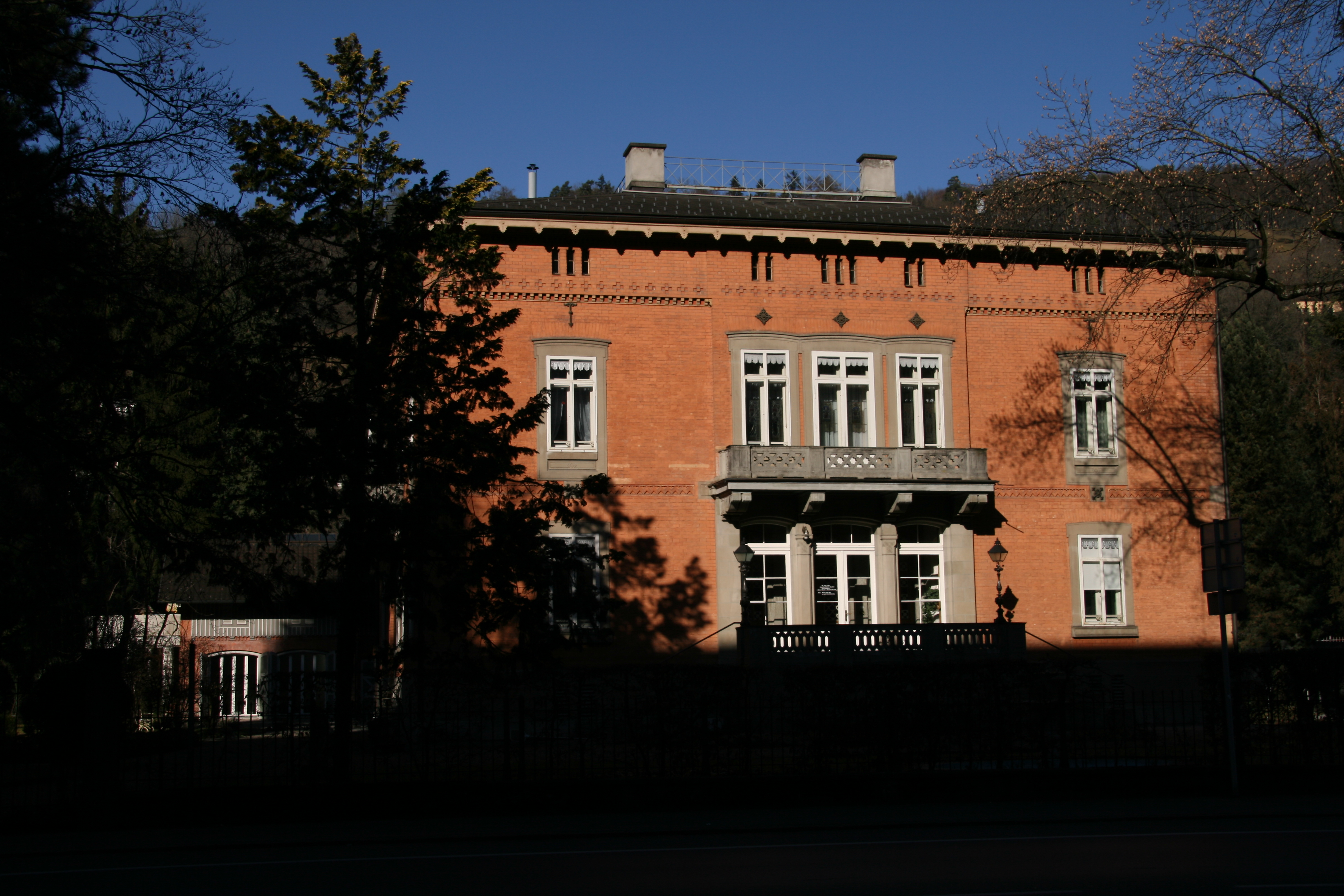 aus dem DEHIO Vorarlberg 1983: Reichsstrasse Nr. 170: Villa Mutter, erbaut 1855/56 von Bauinspektor „Spindler“, die erste bedeutende frühistorische Villenanlage in Vorarlberg. Kubisches Hauptgebäude in parkartigem Garten. Unverputze Backsteinwände auf Sandsteinsockel, 3achsiger flacher Mittelrisalit, Terasse mit seitlichen Treppen, Sandsteinbalkon, umlaufende Geschosstrennung durch Zickzackfries, unter dem Dach Lüftungsschlitze, in den Fenstern Jalousienschabracken aus gepresstem Blech; rückseitig flacher Mittelrisalit mit gekuppelten Fenstern. Originale Ausstattung, im Erdgeschoss strassenseitig repräsentative Suite mit Musikzimmer (Deckenmalerei aus der Bauzeit), Neurenaissance-Kachelöfen, Zinnlavabos, Türen mit Gittern; im Hauptgeschoss Wand- und Deckenmalereien (Ornamentik und Groteske), Stukkaturen, Öfen.*** gesehen in Feldkirch Levis.